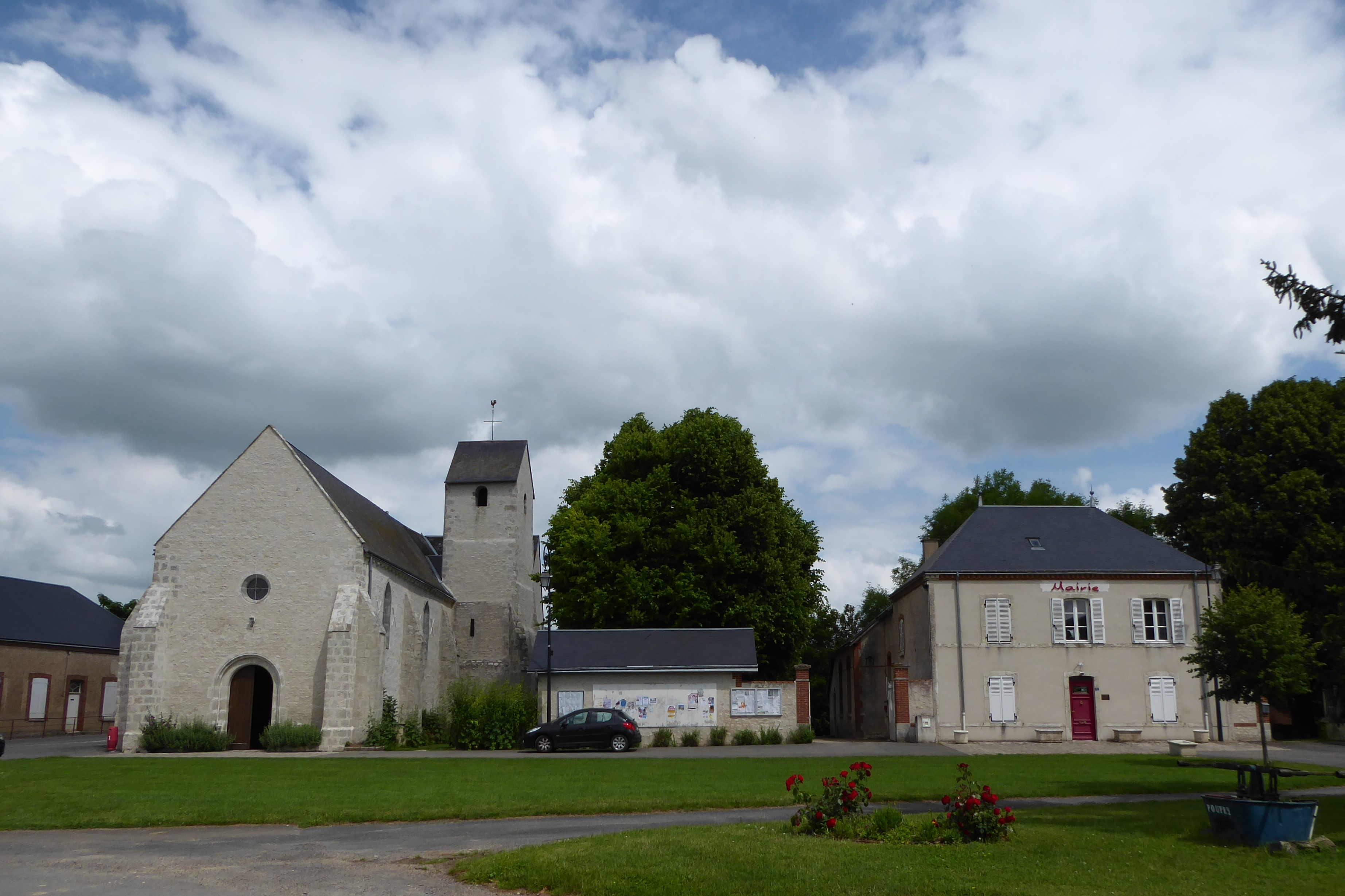 mairie et église Notre-Dame de Poupry, Eure-et-Loir, France.